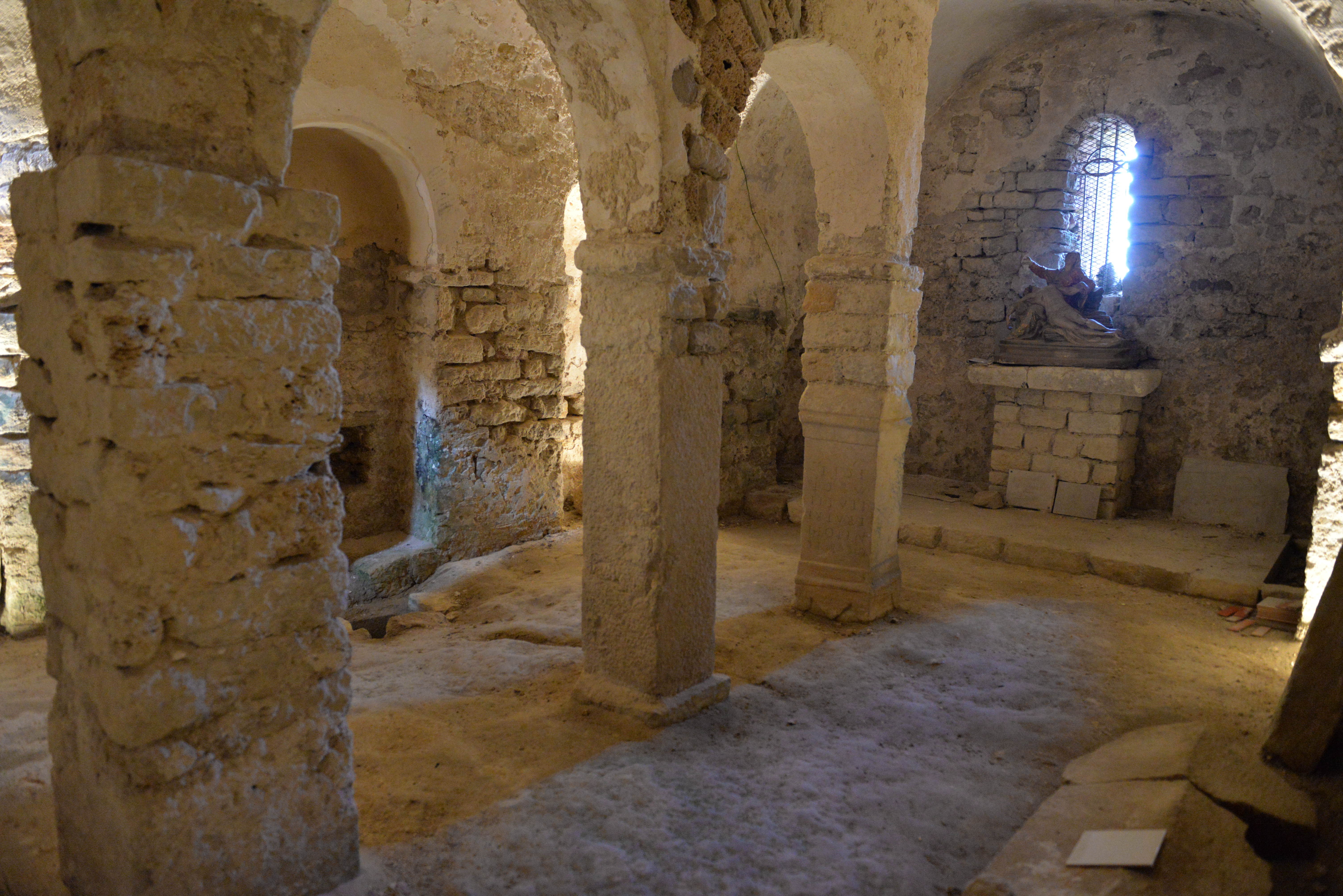 Crypte de l'église Notre-Dame du Brusc de Châteauneuf-Grasse